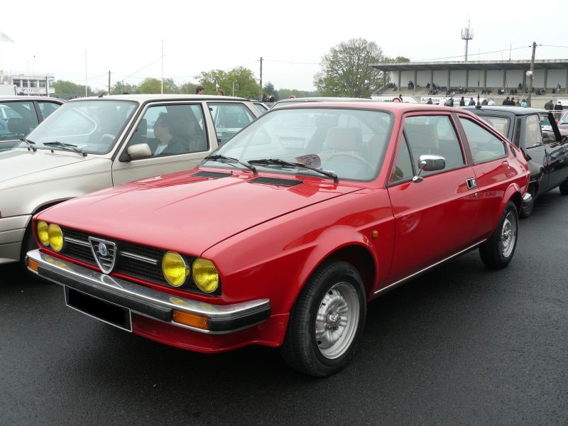 Français cadien: Montlhery Avril 2012